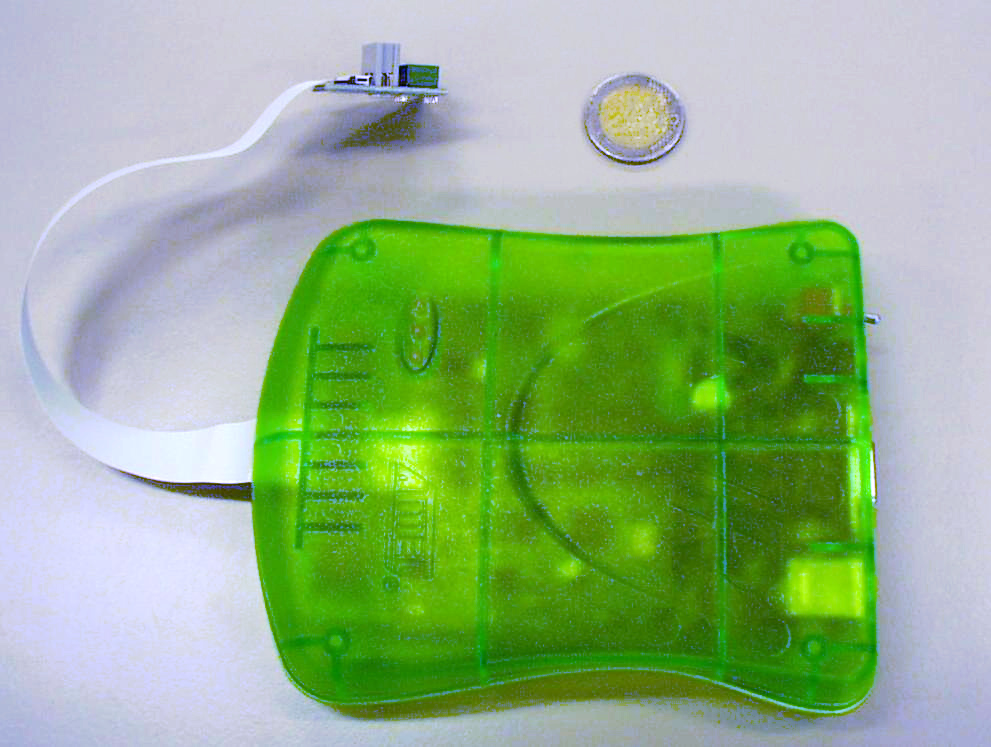 JTAG-Debugger für ATMEL-Microcontroller